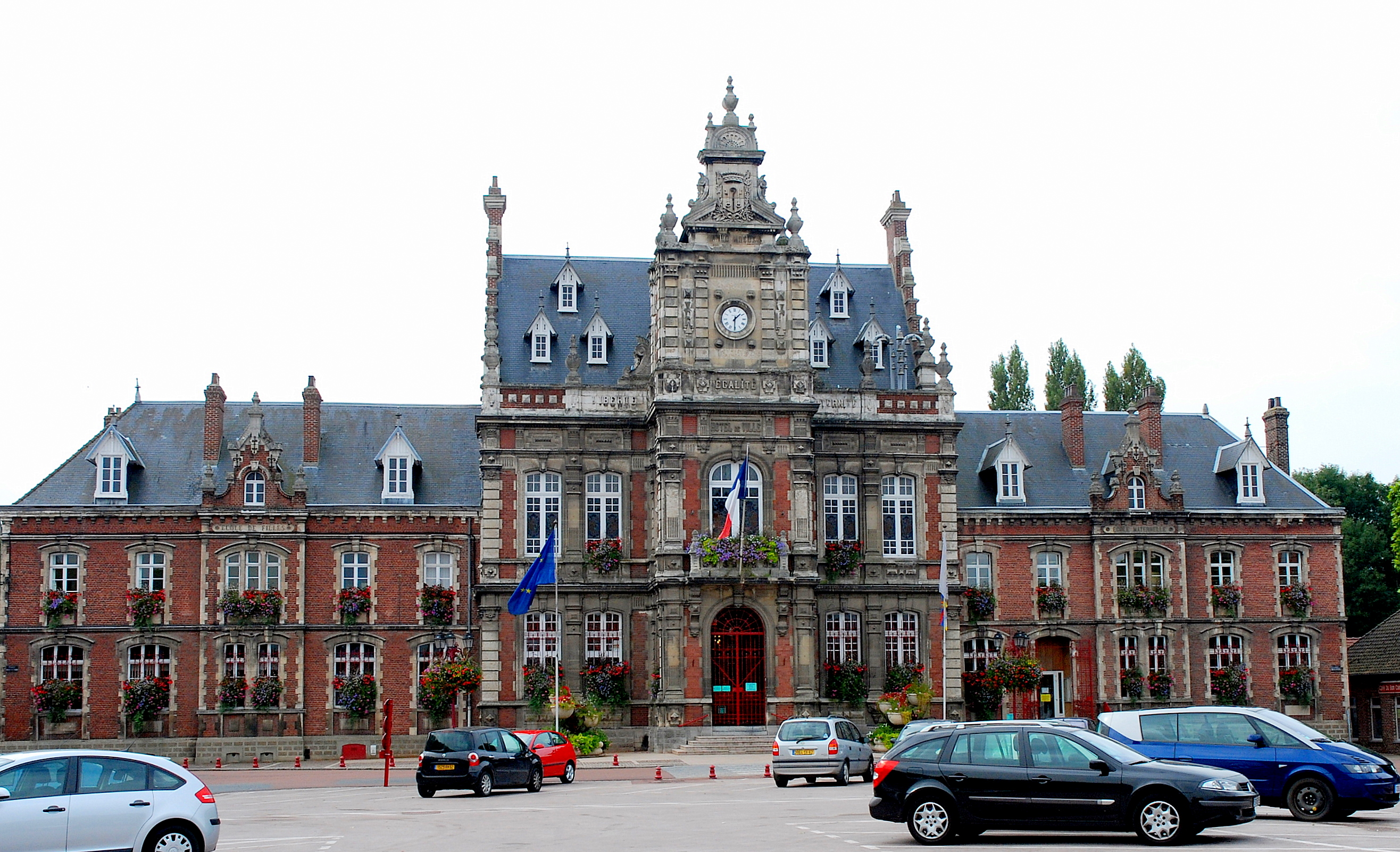 het gemeentehuis van Arques (Arke) in Pas-de-Calais, Frankrijk